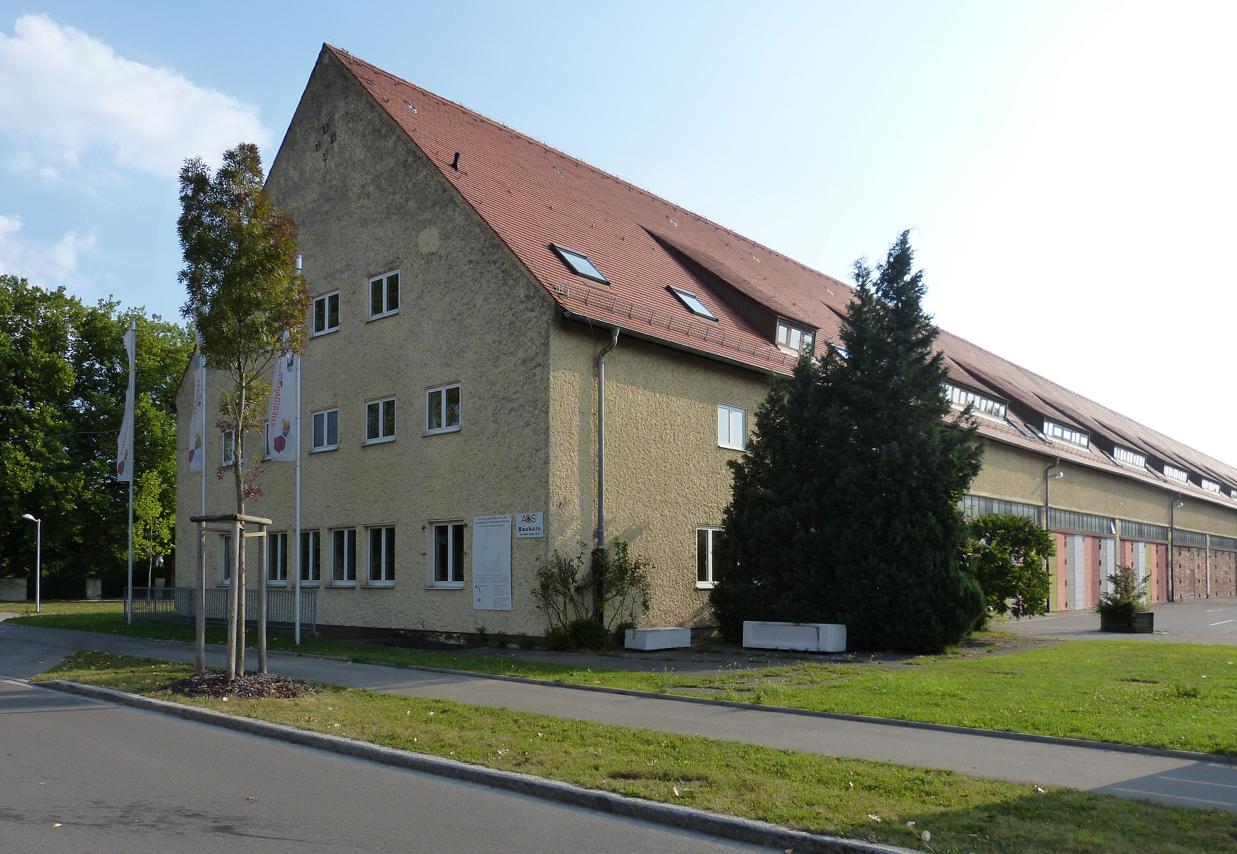 Augsburg, Sheridan-Park, Halle 116. Die Fahrzeughalle wurde von April 1944 bis April 1945 als Außenlager des Konzentrationslagers Dachau verwendet. 1000 bis 2000 männliche Gefangene wurden von dort zu Arbeitseinsätzen in und um Augsburg gebracht, vor allem zur Firma Messerschmitt in Haunstetten. Nach 1945 nutzten die Amerikaner das Gebäude wieder als Fahrzeughalle, daneben auch als Bücherei und Reparaturwerkstätte für Fernseher. Das Gebäude soll als Gedenkstätte erhalten werden.